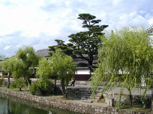 Kurashiki2